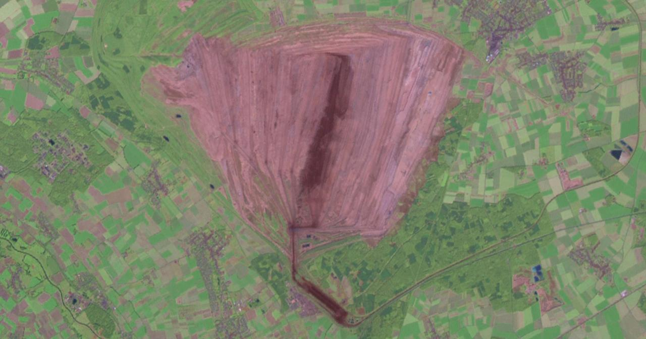 Der Braunkohletagebau Hambach